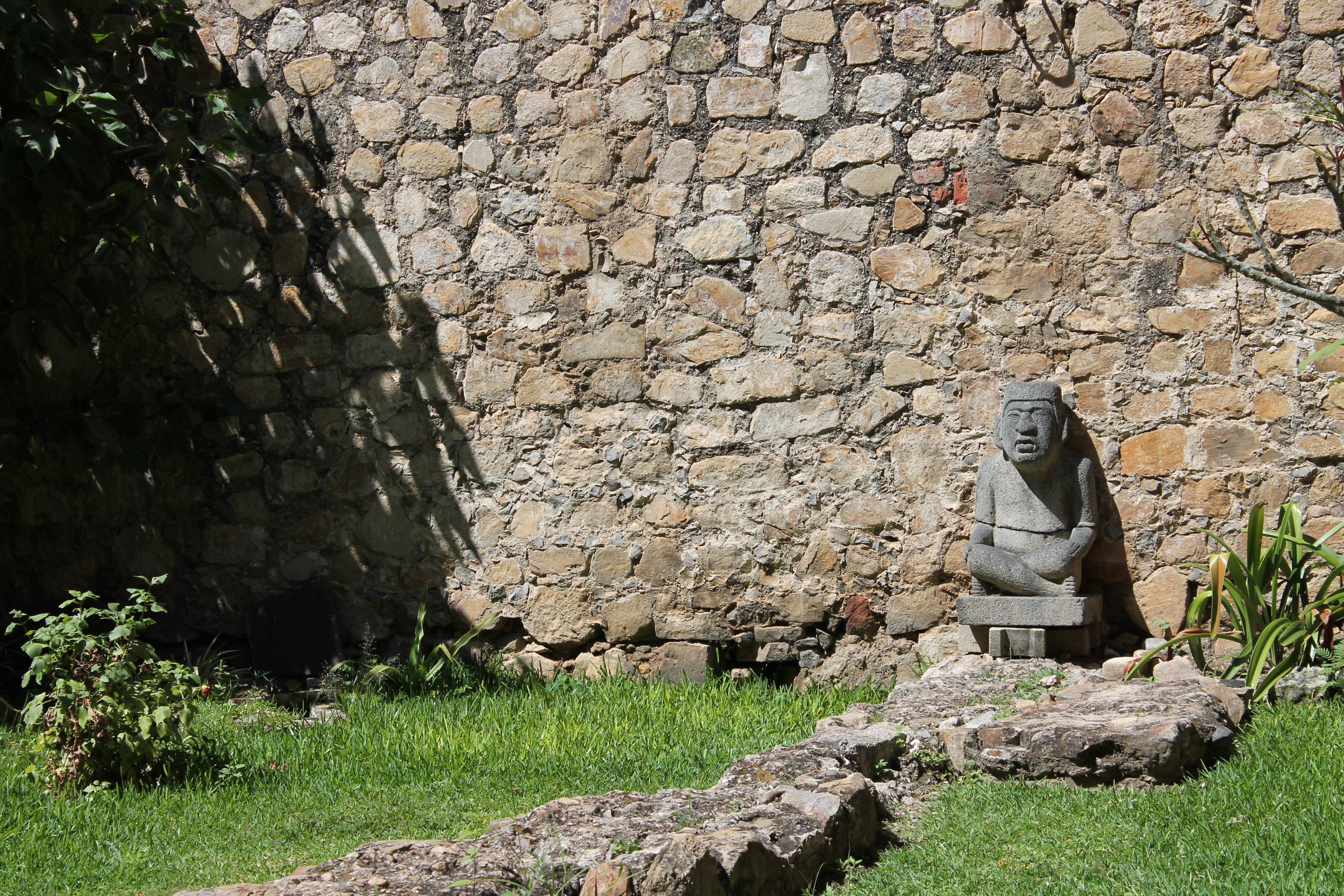 La imagen muestra un jardín al interior del Ex Convento de Santiago Apóstol en Cuilapam Guerrero. Hay un camino de piedra que conduce a una figura humana mixteca, misma que está sentada en posición de loto sobre una base cuadrangular de piedra.